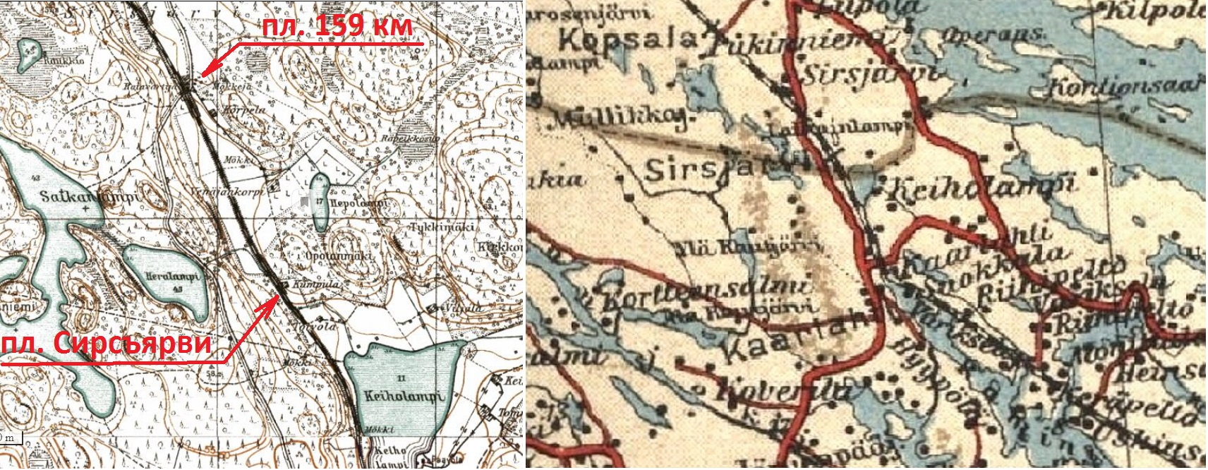 Пл. 159 км и пл. Сирсъярви на карте и схеме.